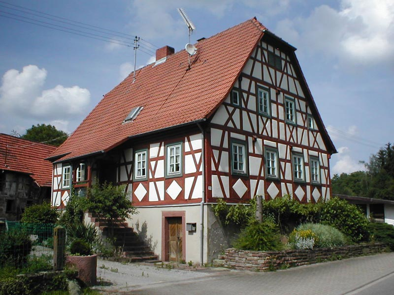 Hist. Fachwerkgebäude von 1805 in Schwarzach (odenwald)